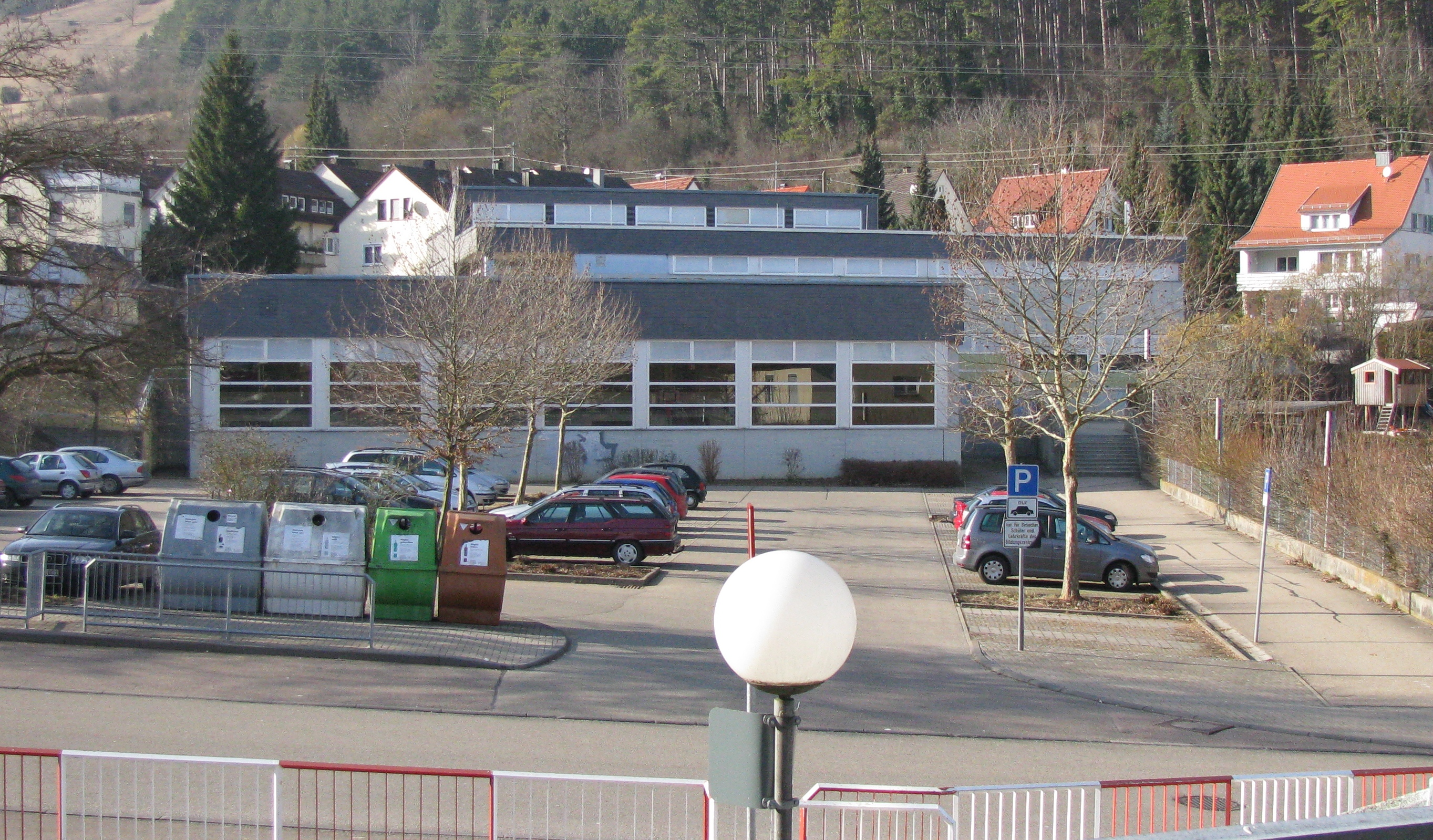 Bopfinger Hallenbad mit zugehöriger Turnhalle im Vordergrund